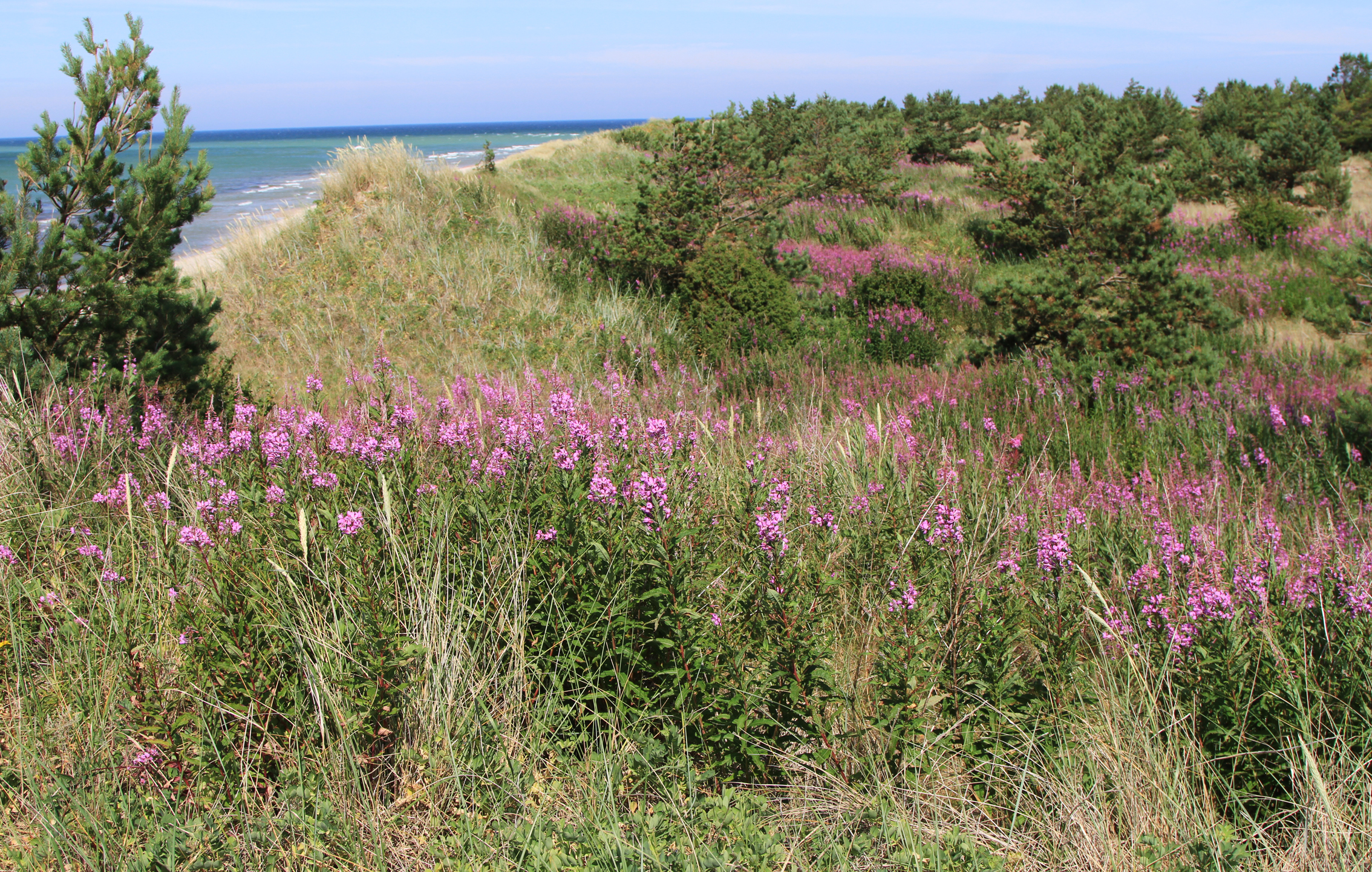 Heath vegetarian on sandy terrain in Gotska Sandön